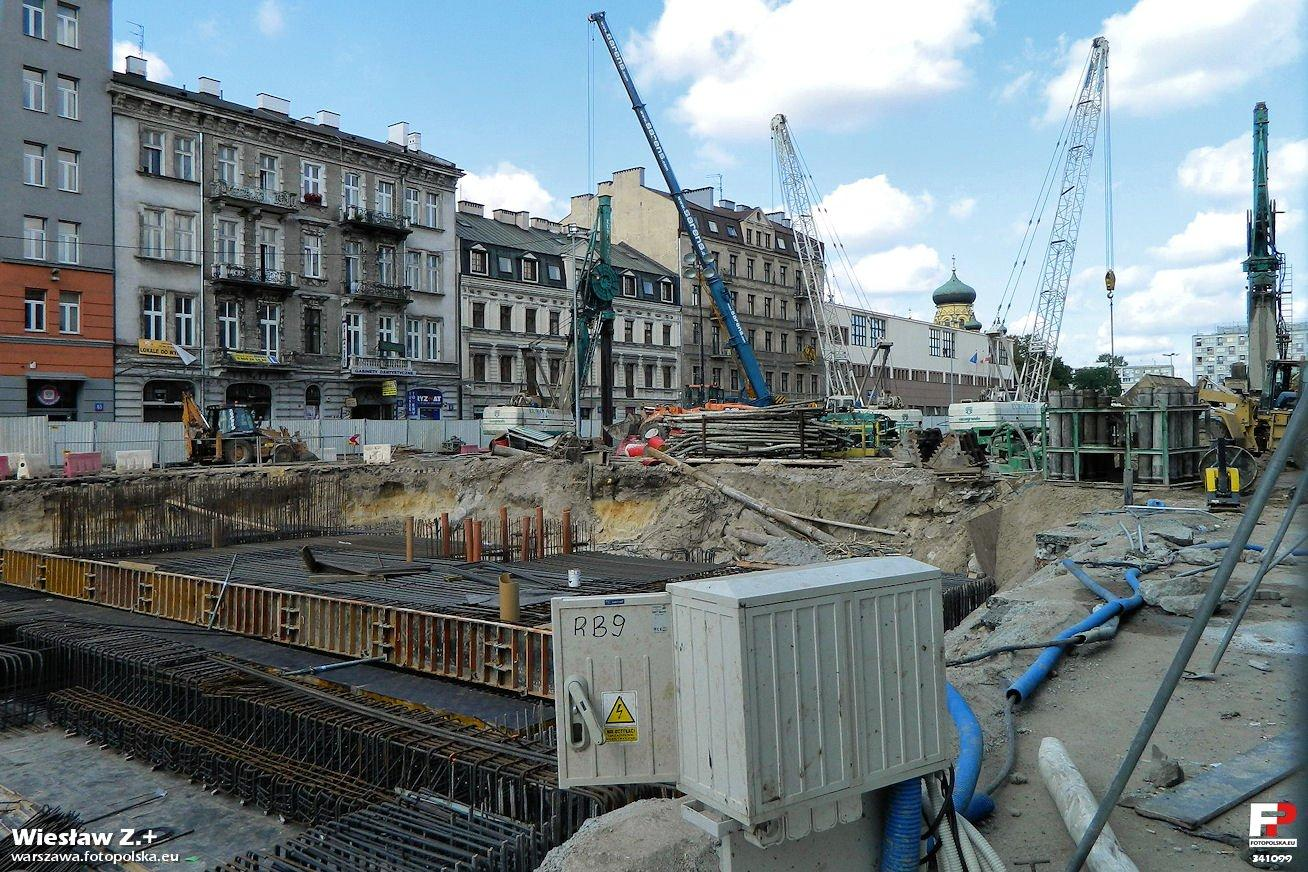 Budowa II linii metra ul. Targowa na wysokości ul. Białostockiej